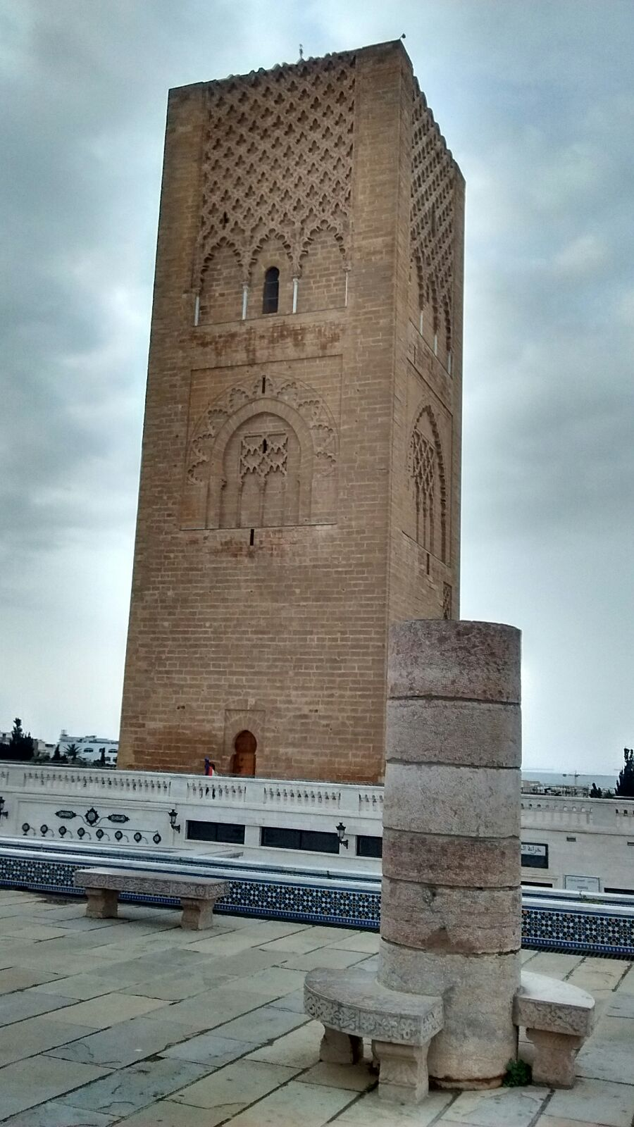 صومعة حسان هي إحدى الآثار الدينية و التاريخية وقد تم تشيدها في عهد دولة الموحدين بأمر من يعقوب المنصور عام 593 هجرياً سنة 1197 ميلاد